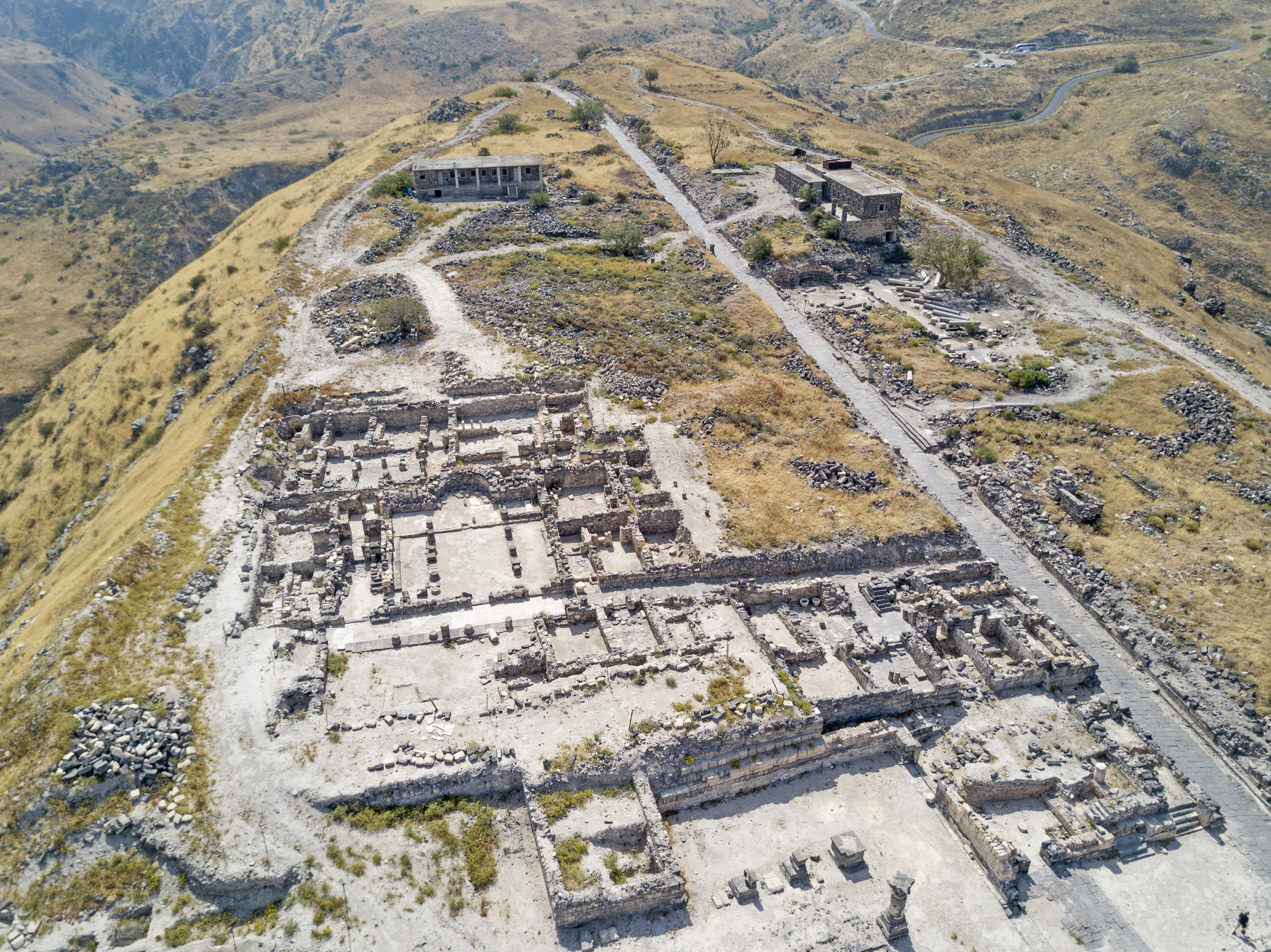 תצלום אוויר של האתר הארכאולוגי סוסיתא אפריל 2017